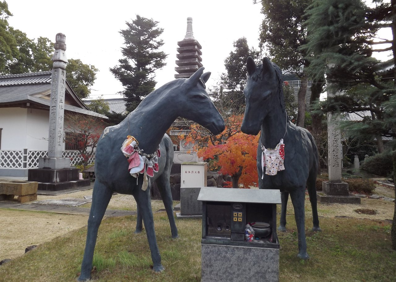 本山寺の馬